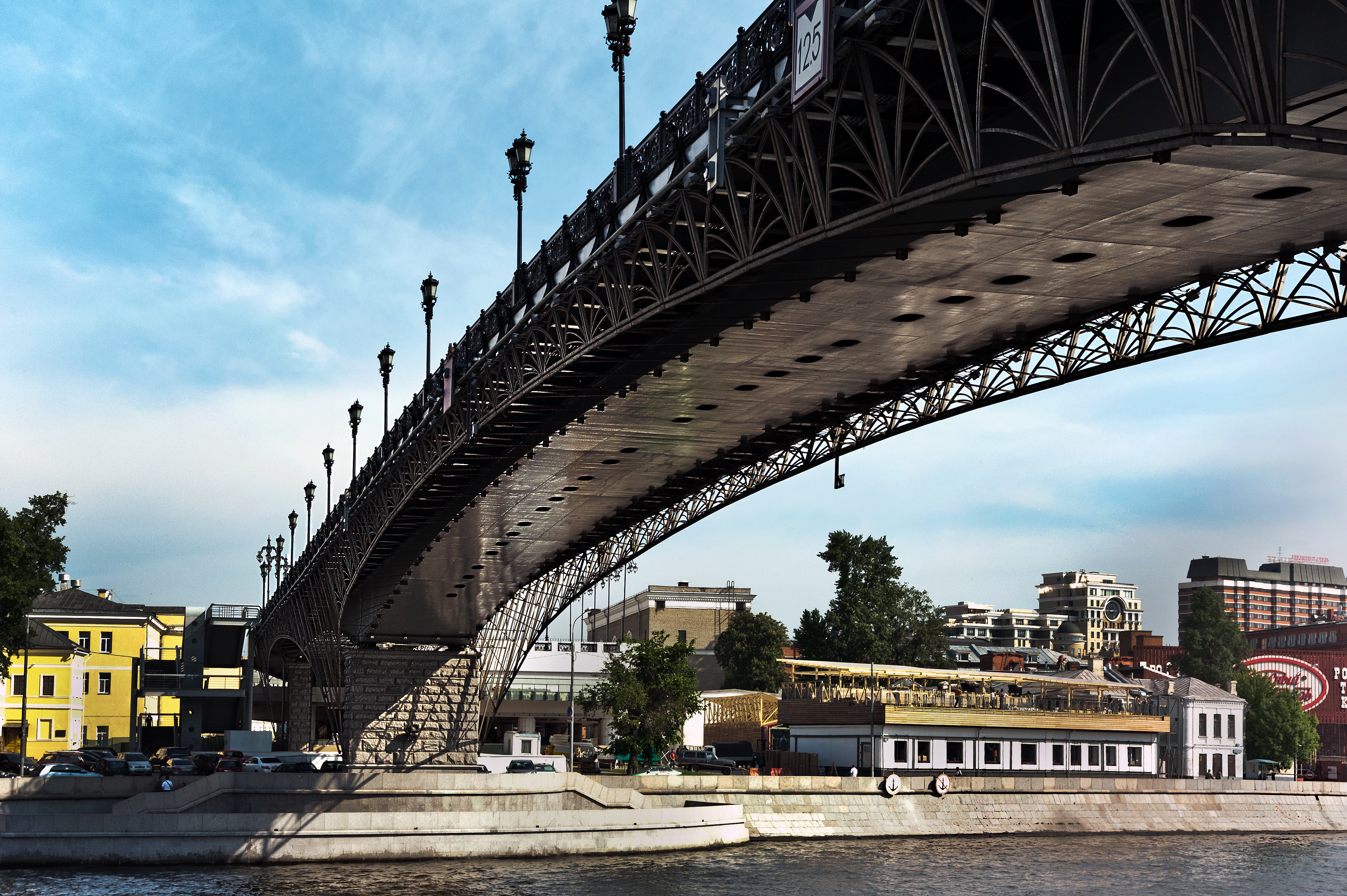 Moskva river Bridge from River Side